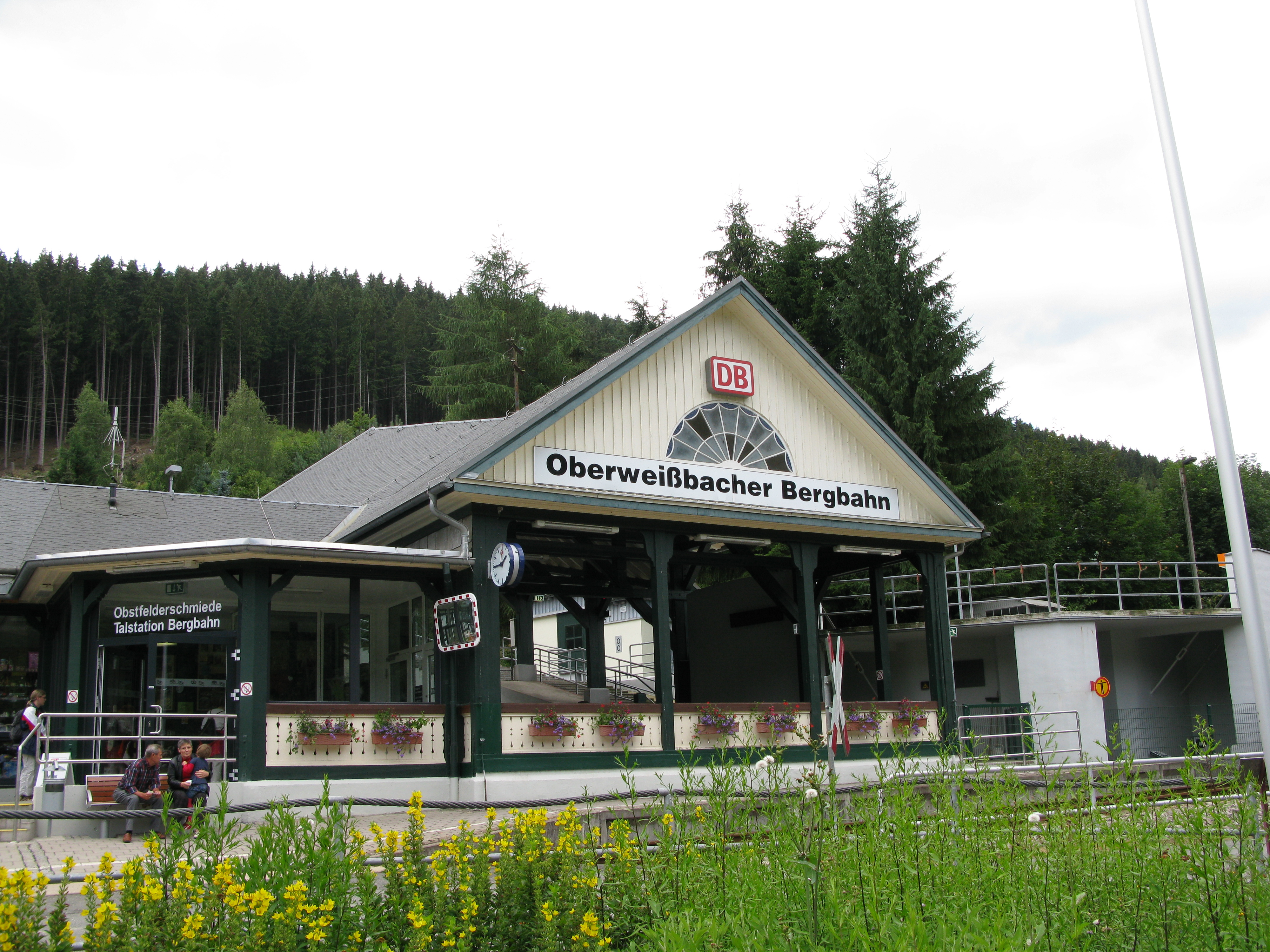 Obstfelderschmiede: Talstation der Oberweißbacher Bergbahn sowie Haltepunkt der Schwarzatalbahn